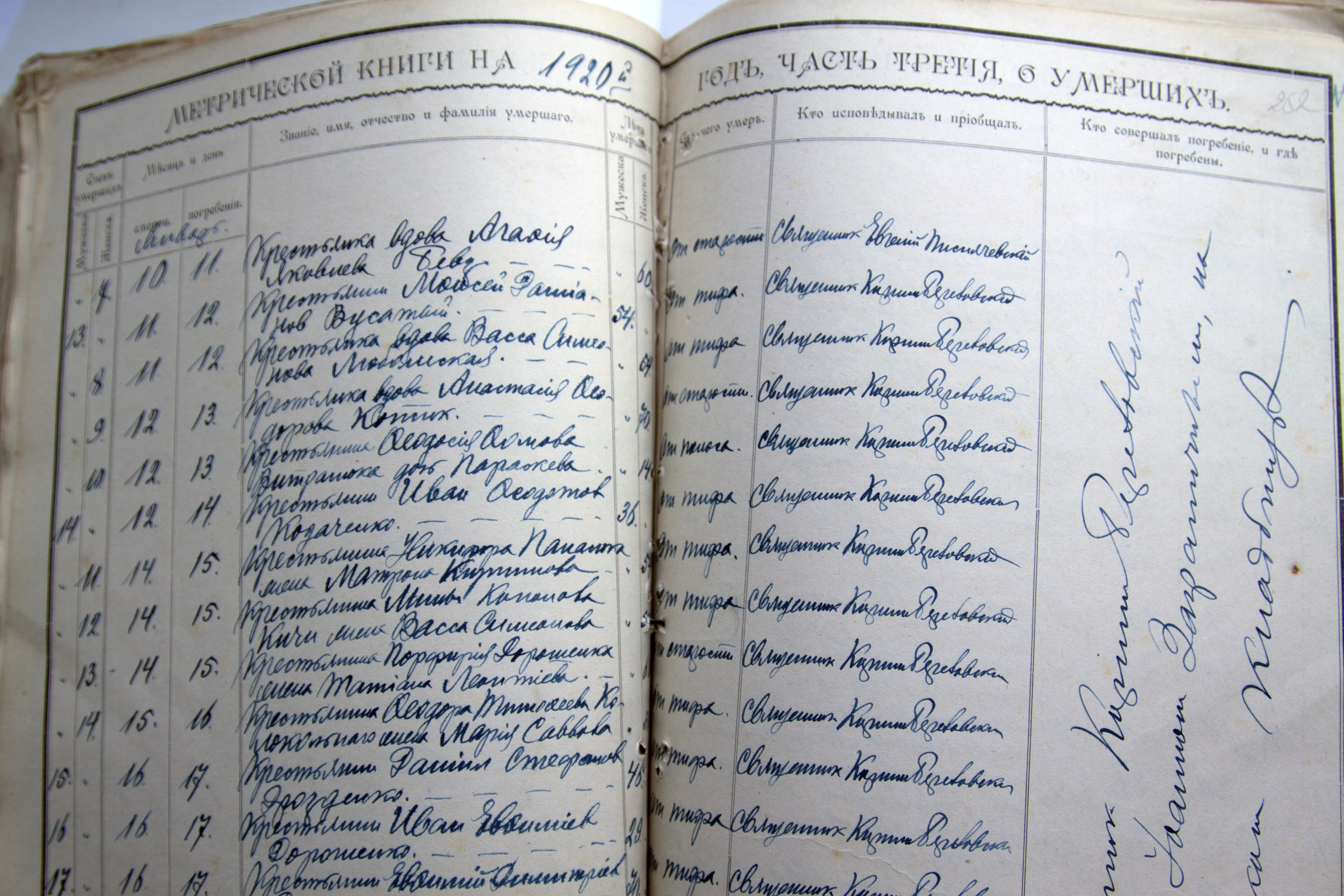 Севастянівка 1920